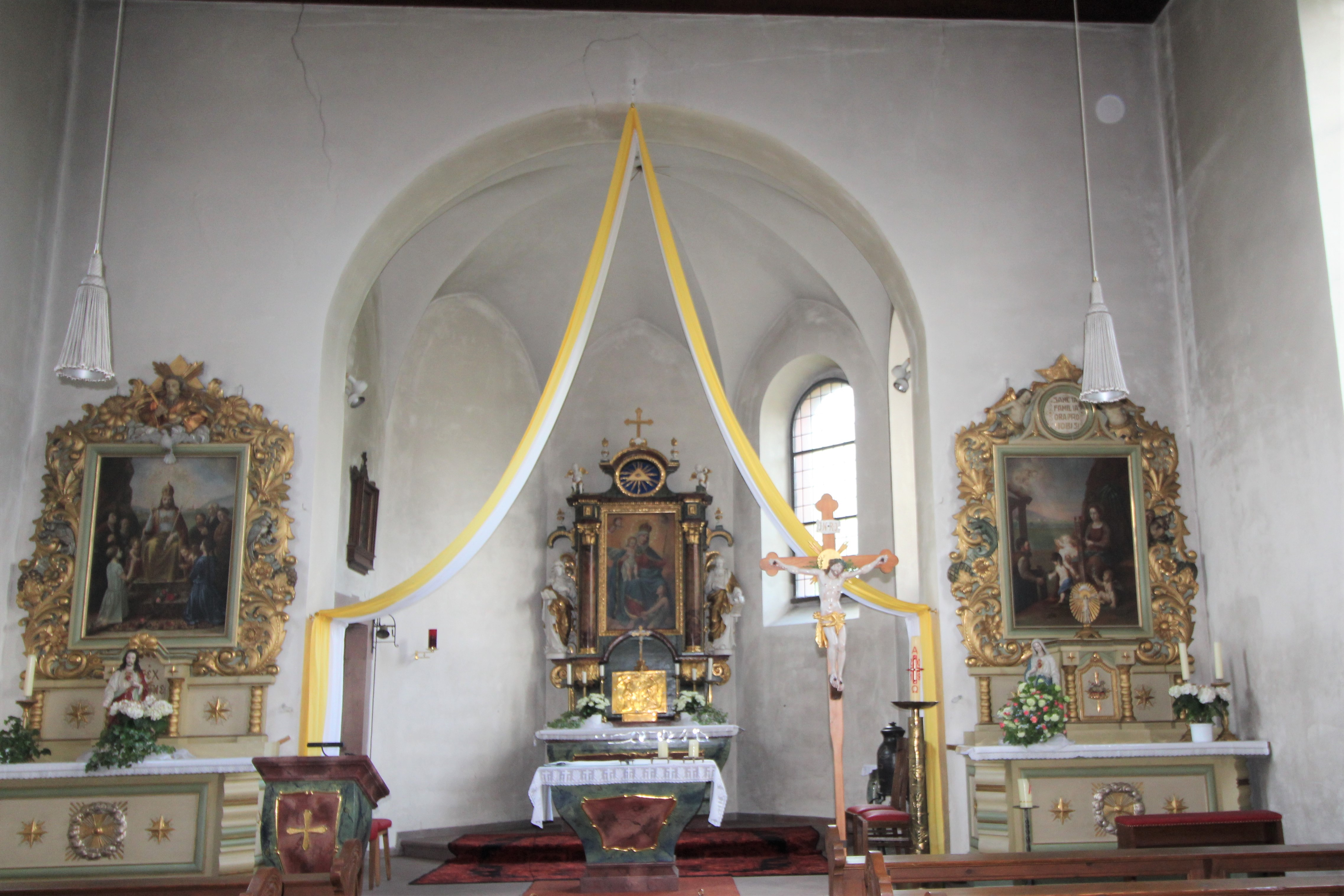 Die Kirche